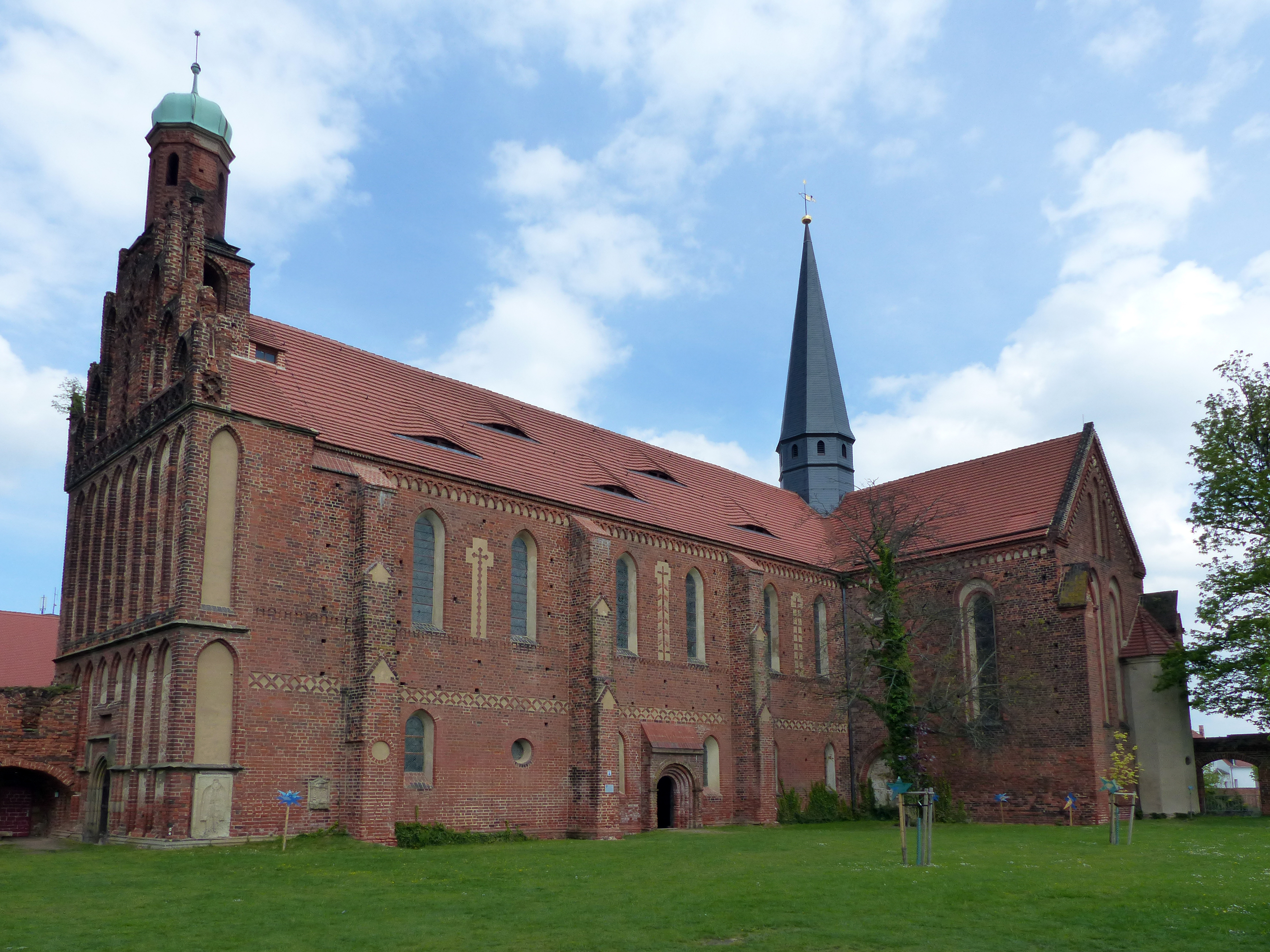 Klosterkirche St. Maria (Mühlberg an der Elbe), Brandenburg